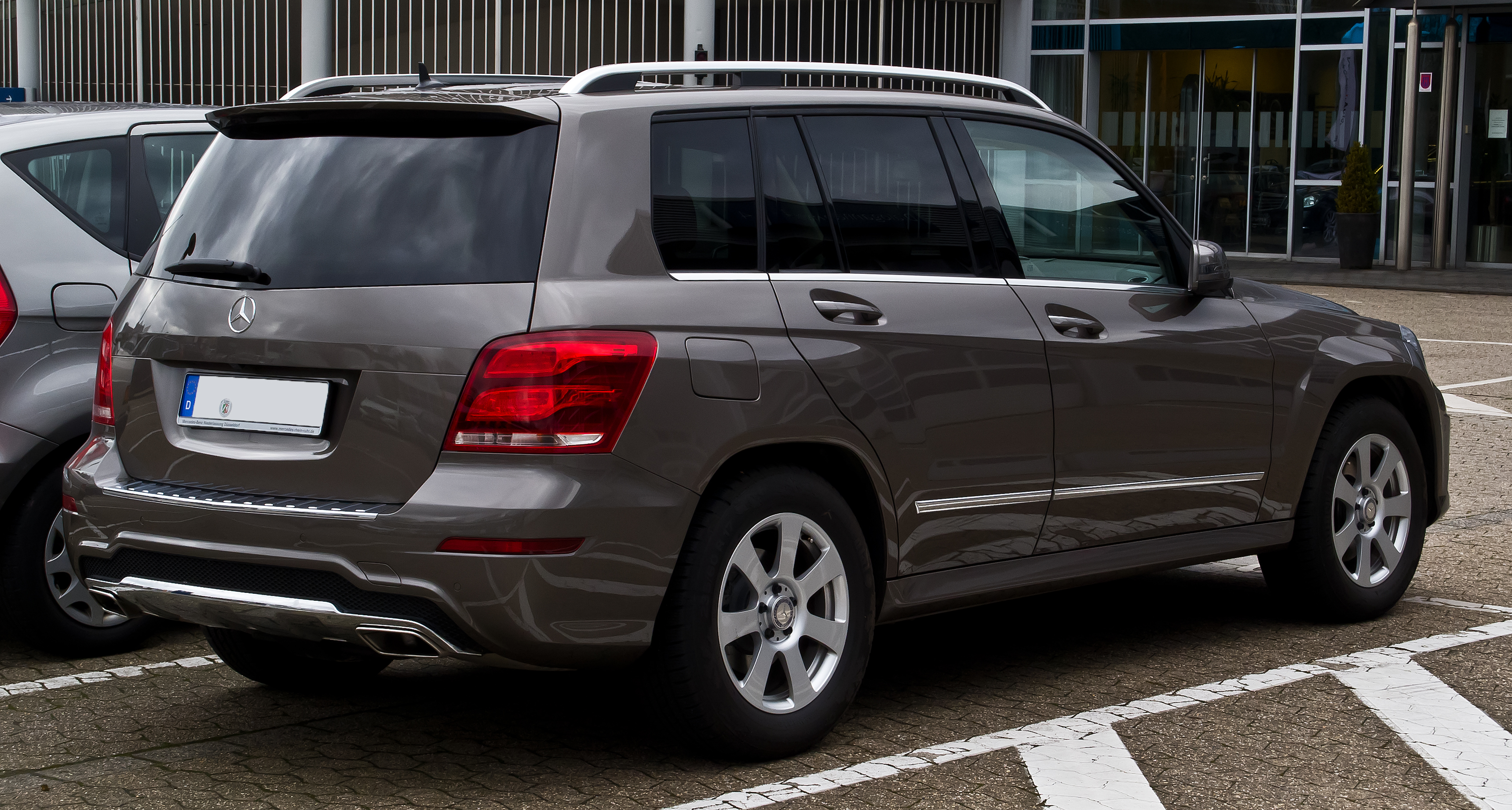 Mercedes-Benz GLK 250 BlueTEC 4MATIC Sport-Paket AMG (X 204, Facelift)